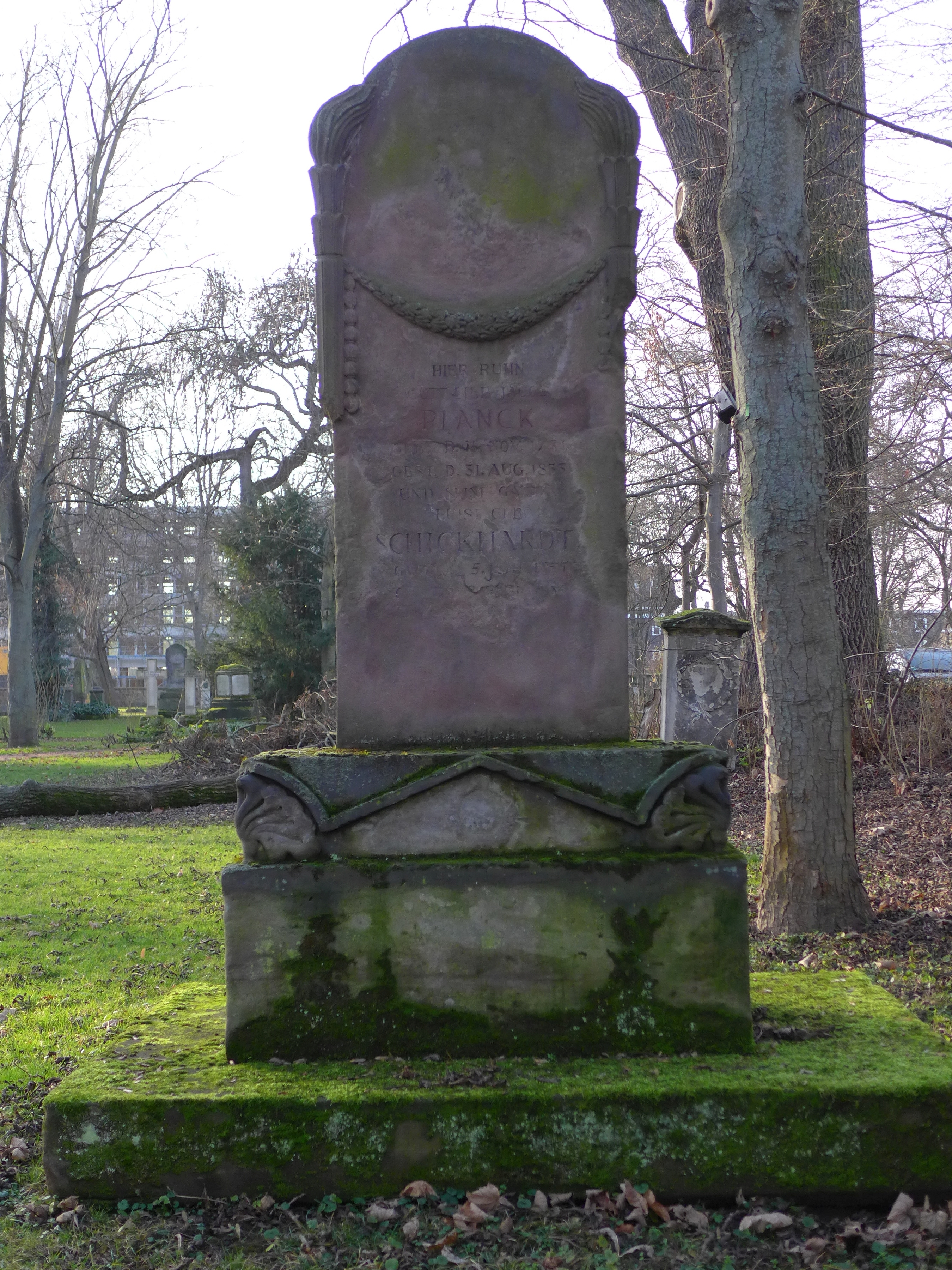 Ruhestätte